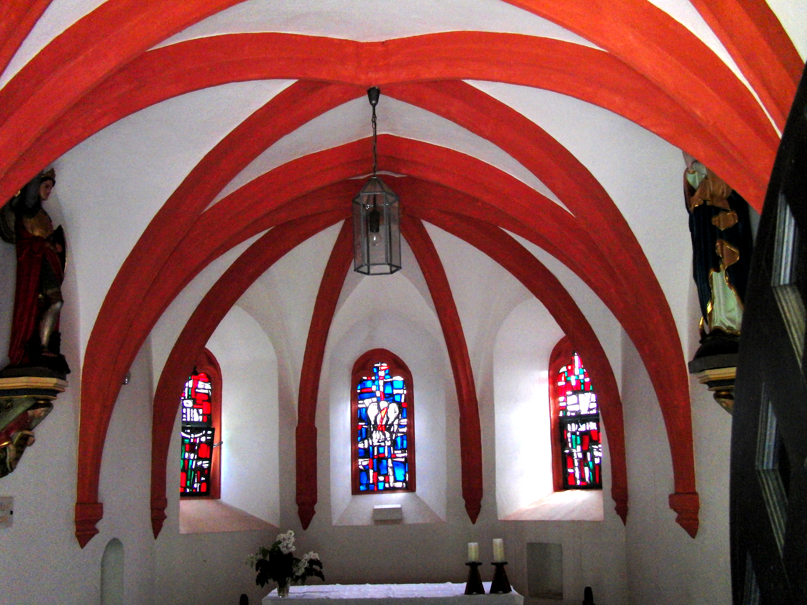 Innenansicht der gotischen Michaelskapelle bei Taben-Rodt, Blick in den Innenraum mit den kreuzgerippten Gewölbe und dem dreiseitigen Chorraum mit seinen bleiverglasten Fenstern